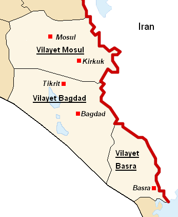 die karte zeigt die ehemaligen drei osmanischen vilayets, aus denen der irak geformt worden ist